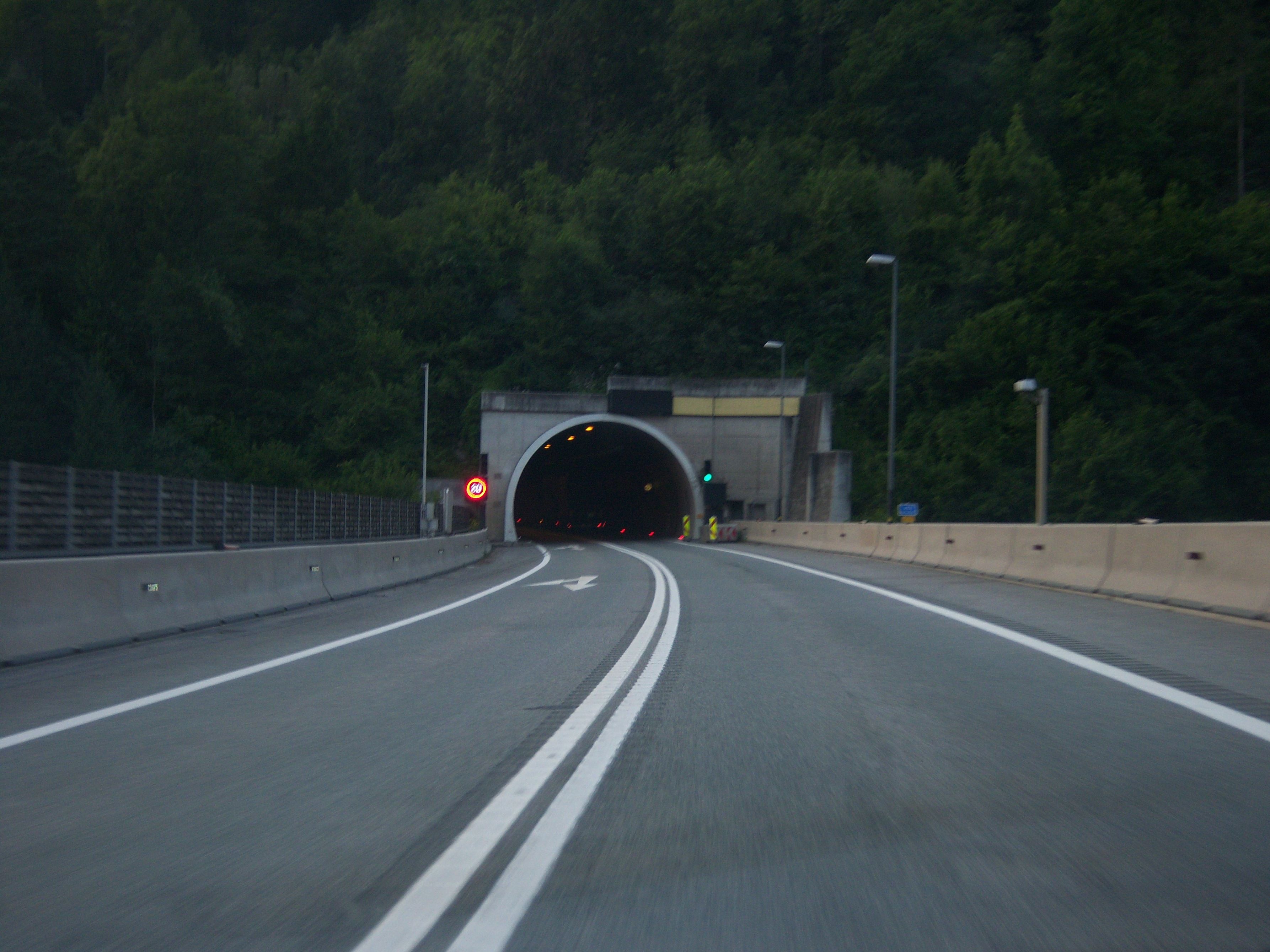 Pyhrn Autobahn A9 Richtung Voralpenkreuz vor dem Falkensteintunnel (Tunnelkette Klaus)